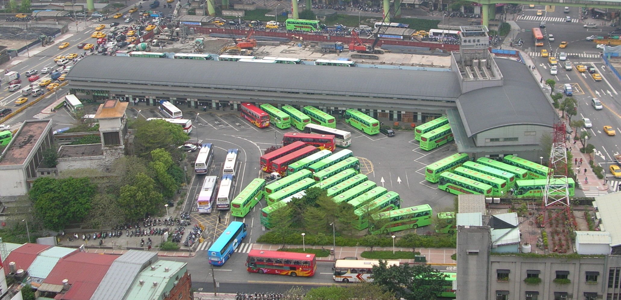 中文（台灣）: 國道客運臺北總站，位於臺北市中正區重慶北路西側、內政部警政署鐵路警察局總局北側，已拆除。